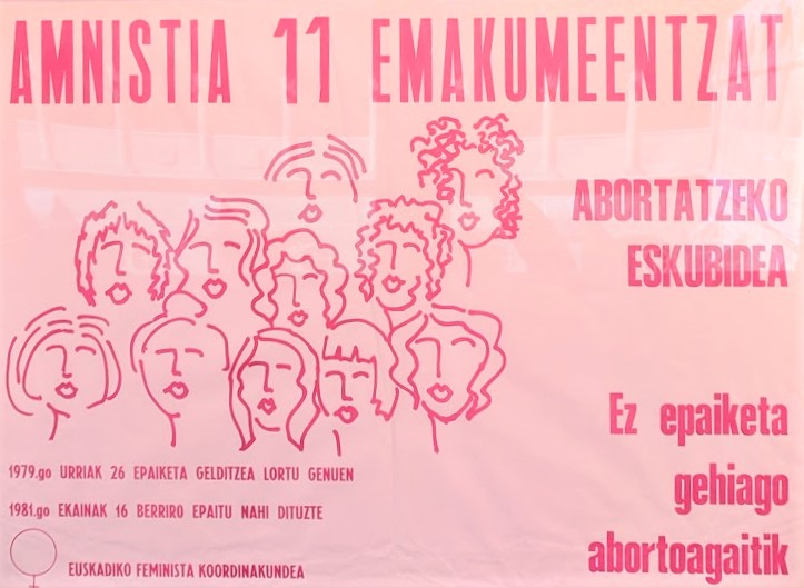 1976ko irailaren 6an Basaurin 11 atxiloketa egon ziren: 9 abortatzeagatik eta 2 abortatzen laguntzeagatik. Erantzun bezala, emakume-taldeek Bilboko kaleak okupatu eta haien askatasuna eskatu zuten. Bi aldiz atzeratuta izan ondoren, epaiketa 1982an burutu zen Bilbon Justizia Auzitegiaren kanpoan Mugimendu Feministaren aldarrikapenen artean.